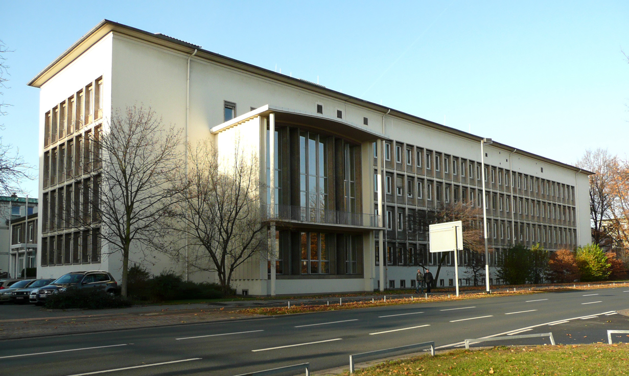 Niedersächsisches Ministerium für Ernährung, Landwirtschaft, Verbraucherschutz und Landesentwicklung